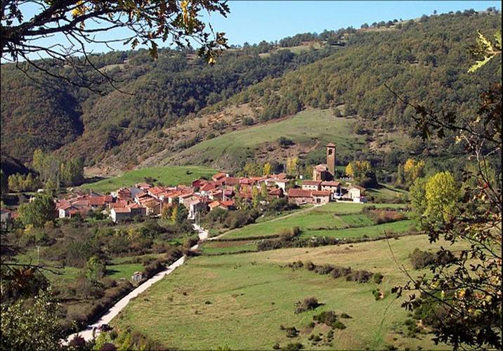 Panoramica de Riocavado de la Sierra